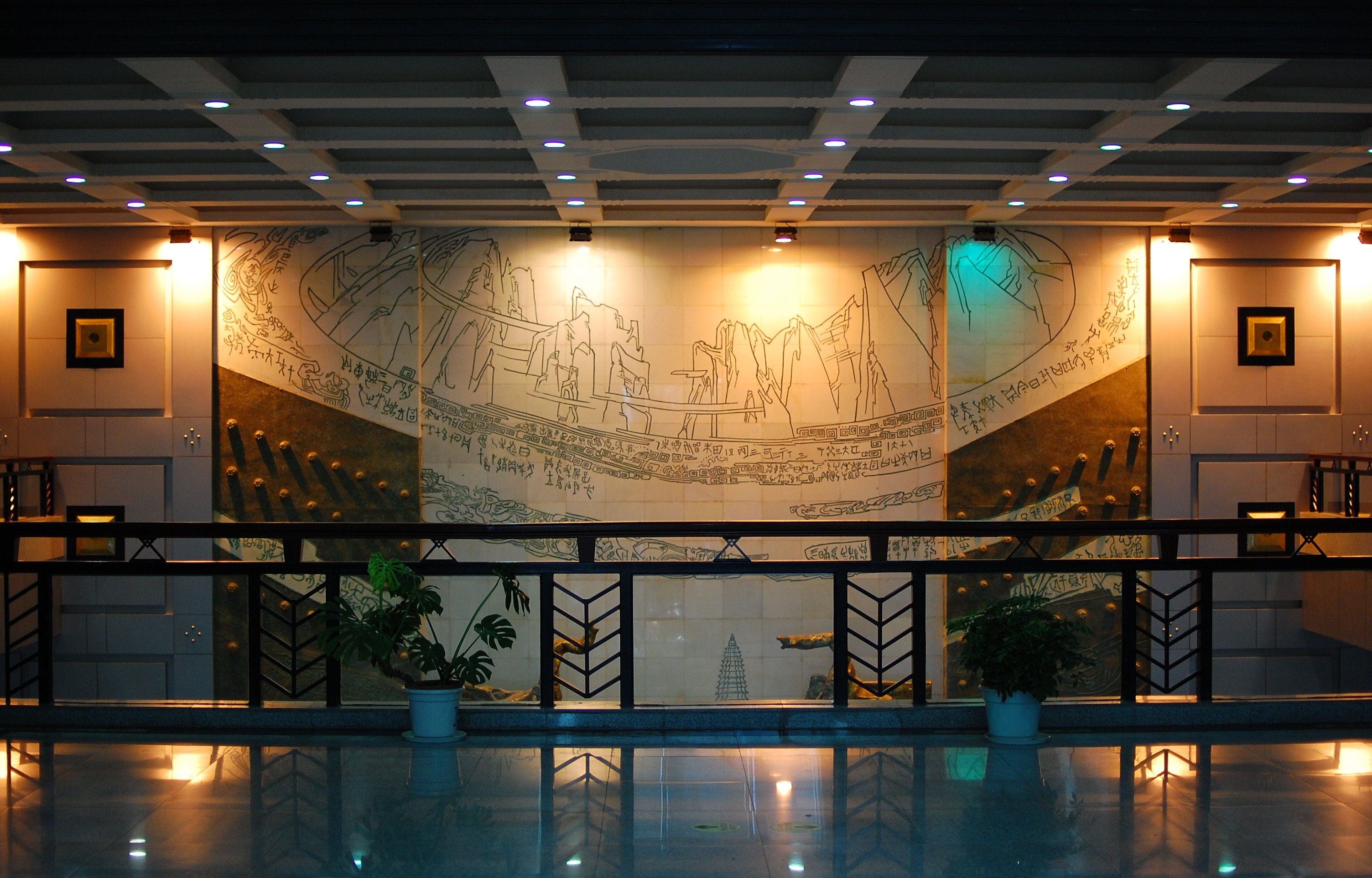 河南博物院内部陈设